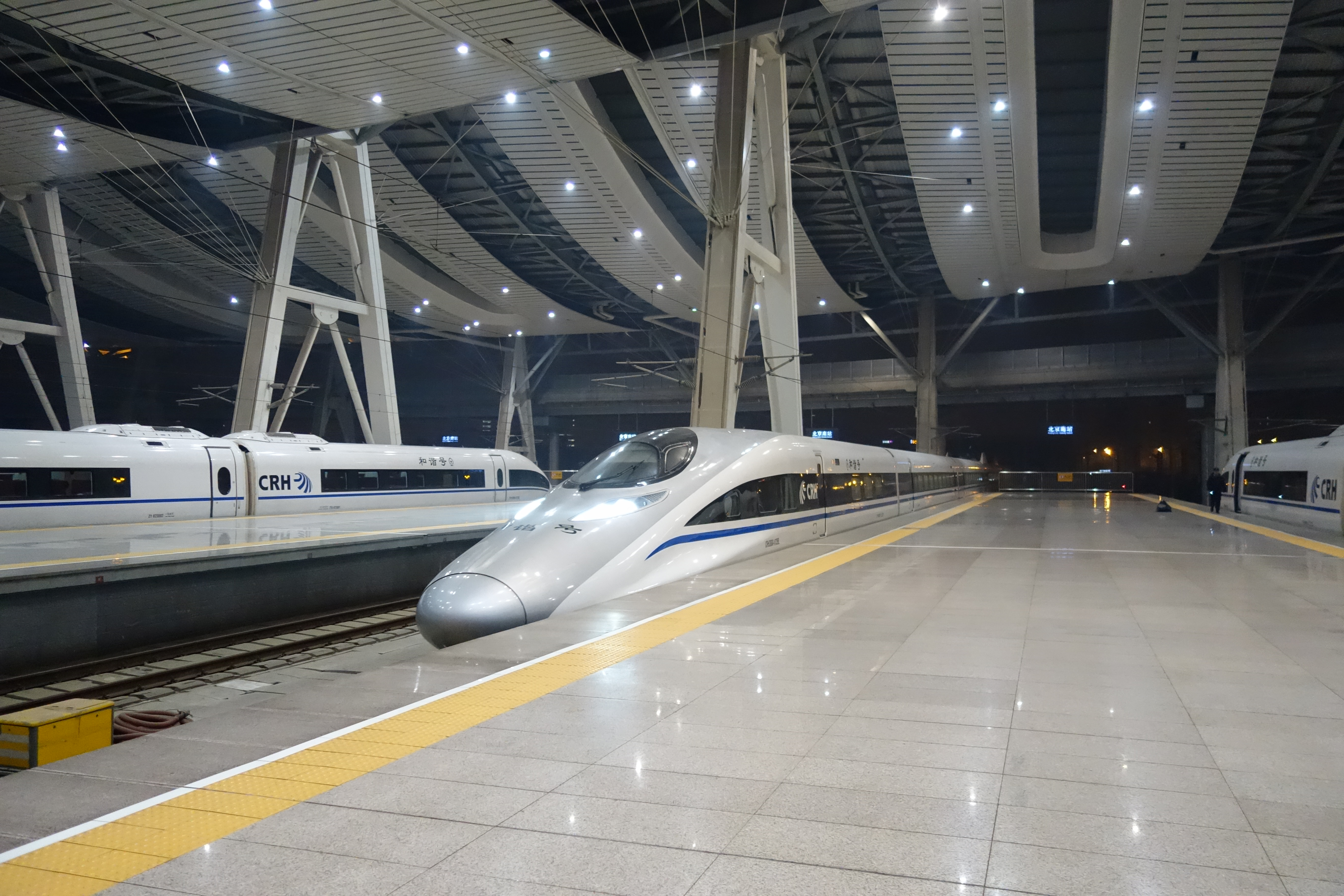 CRH380AL列车驶入北京南站